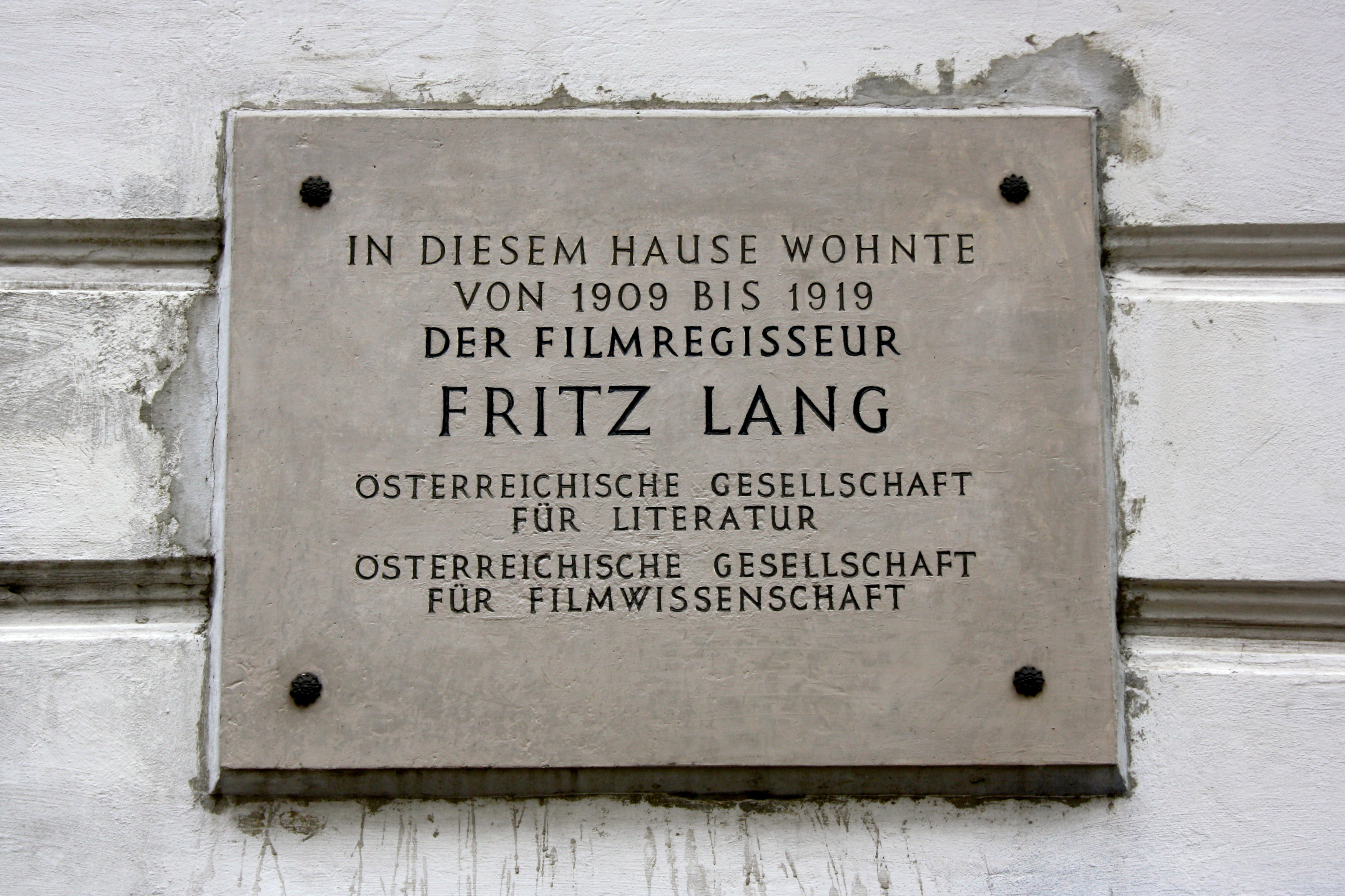 Gedenktafel für Fritz Lang am Wohnhaus Zeltgasse 1, Wien-Josefstadt.